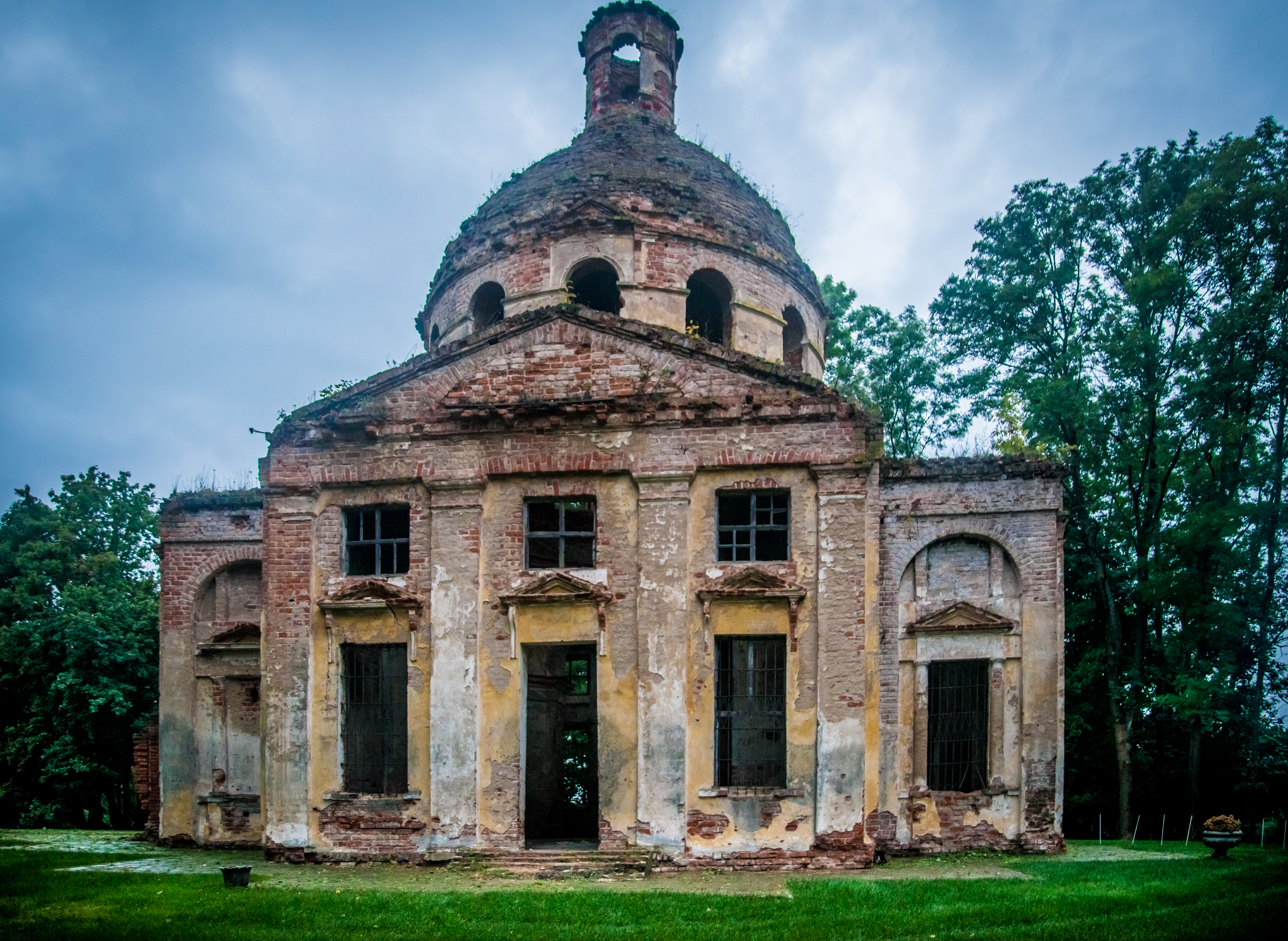 Церковь Троицы: Герчики, Смоленский район, Смоленская область